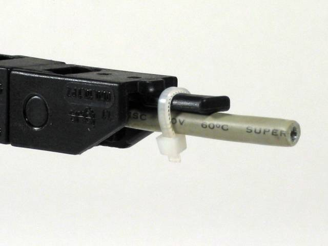 Endstueck einer Energiekette mit Kabel. Das Kabel ist mit einem Kabelbinder (nach dem Befestigen gekuerzt) an der Zunge des Endstueckes befestigt. Dadurch wird das Kabel zugentlastet.